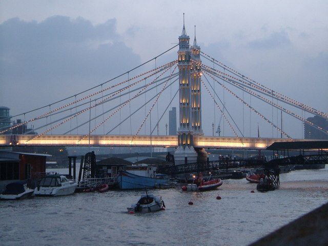 Albert Bridge at dusk